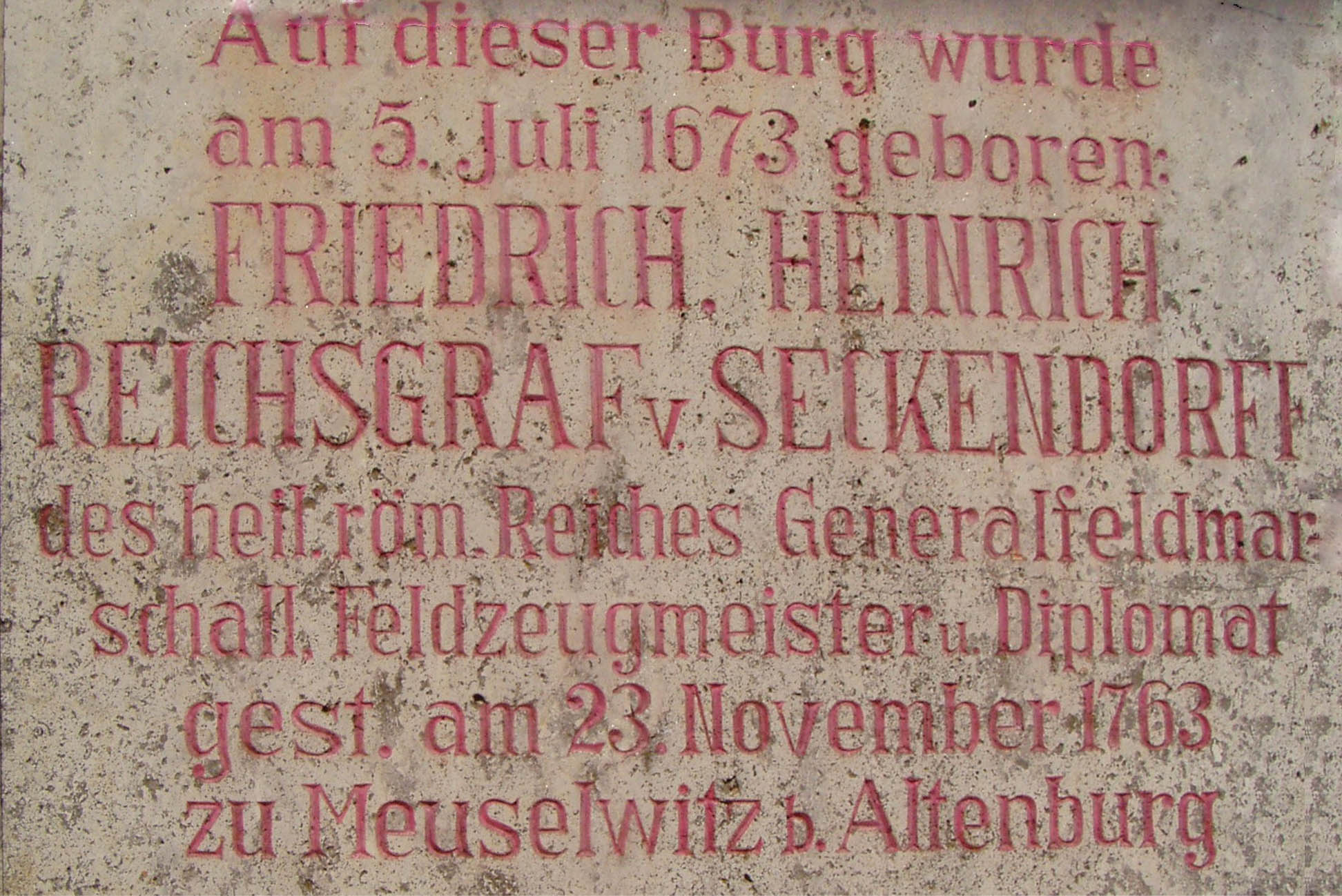 Gedenktafel in Königsberg für Friedrich Heinrich von Seckendorff (1673-1763)